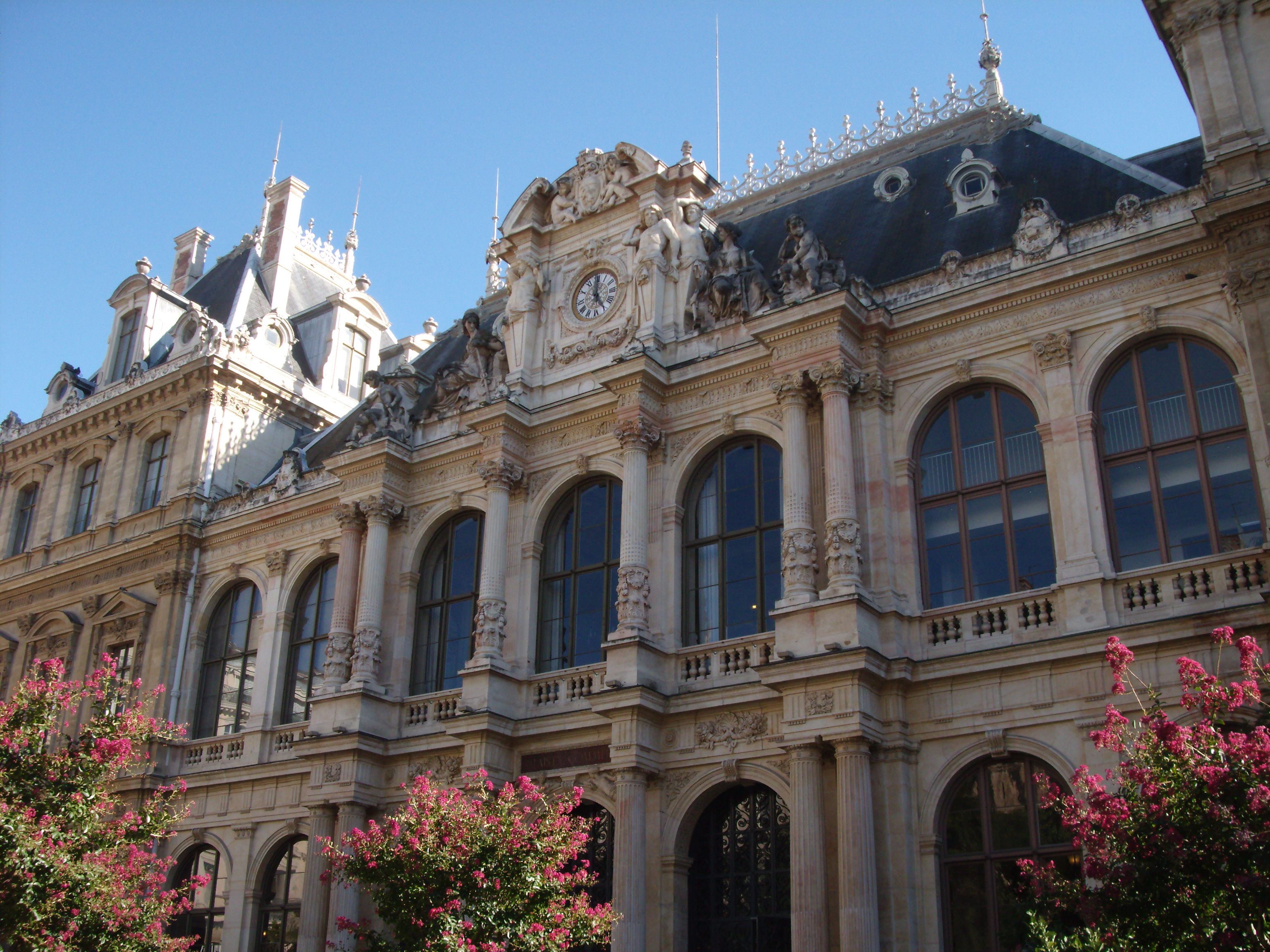 Le Palais du Commerce, sur la Presqu'île lyonnaise, accueille la Chambre de Commerce et d'Industrie de Lyon